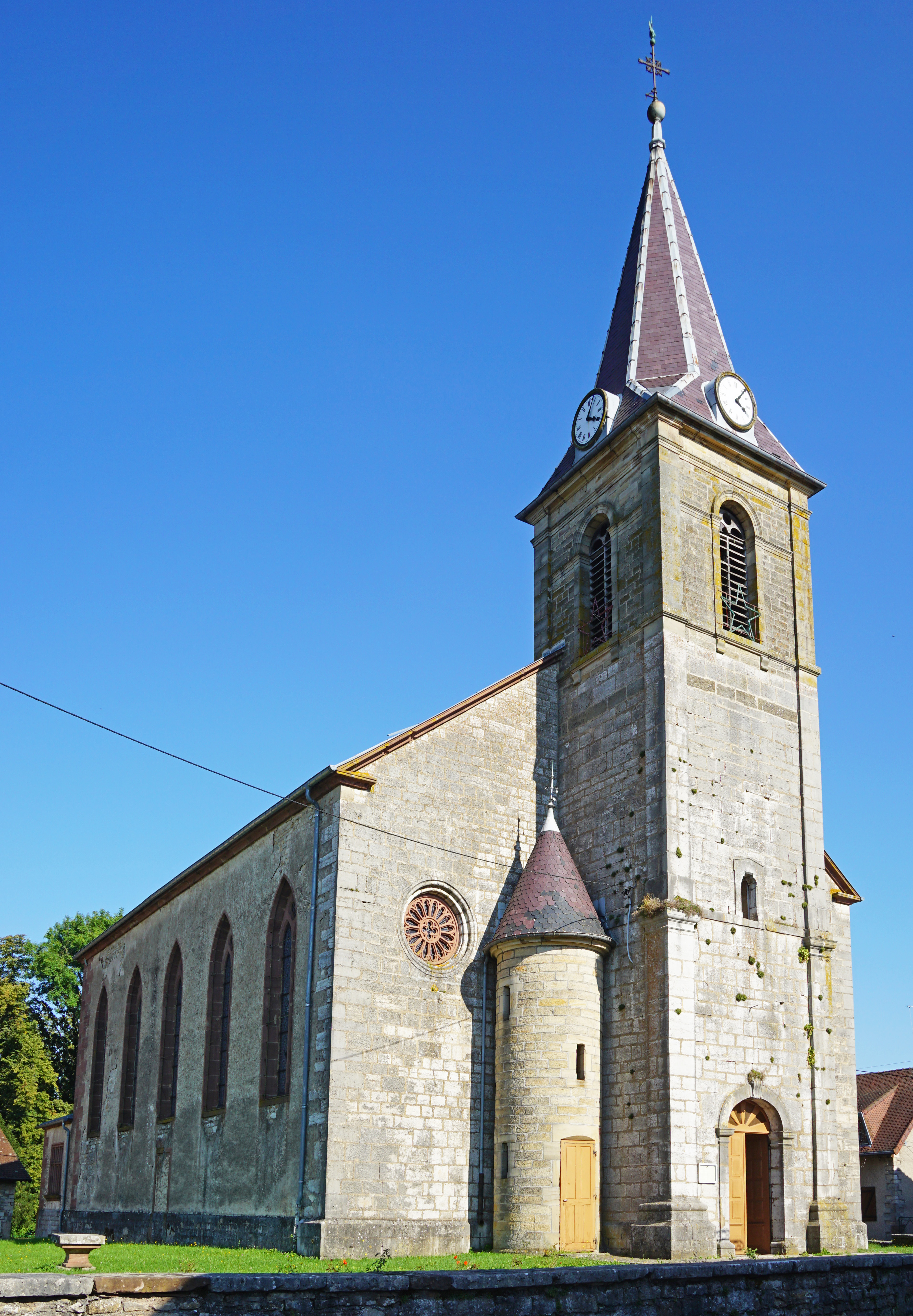 L'église de Fallon (Haute-Saône).